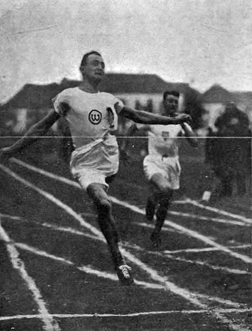 Od lewej Tadeusz Armański i Stefan Adamczak w biegu na 100m w ramach dzięsięcioboju na MP 1924)